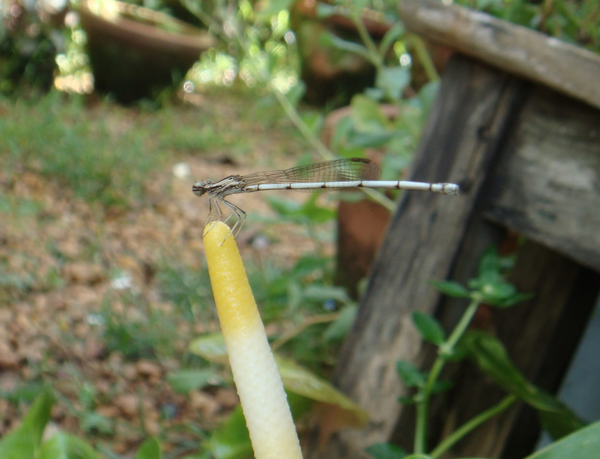 വാലൻ‍തുമ്പി. ചള്ളിയാന്‍റെ തോട്ടത്തില്‍ വന്നത്